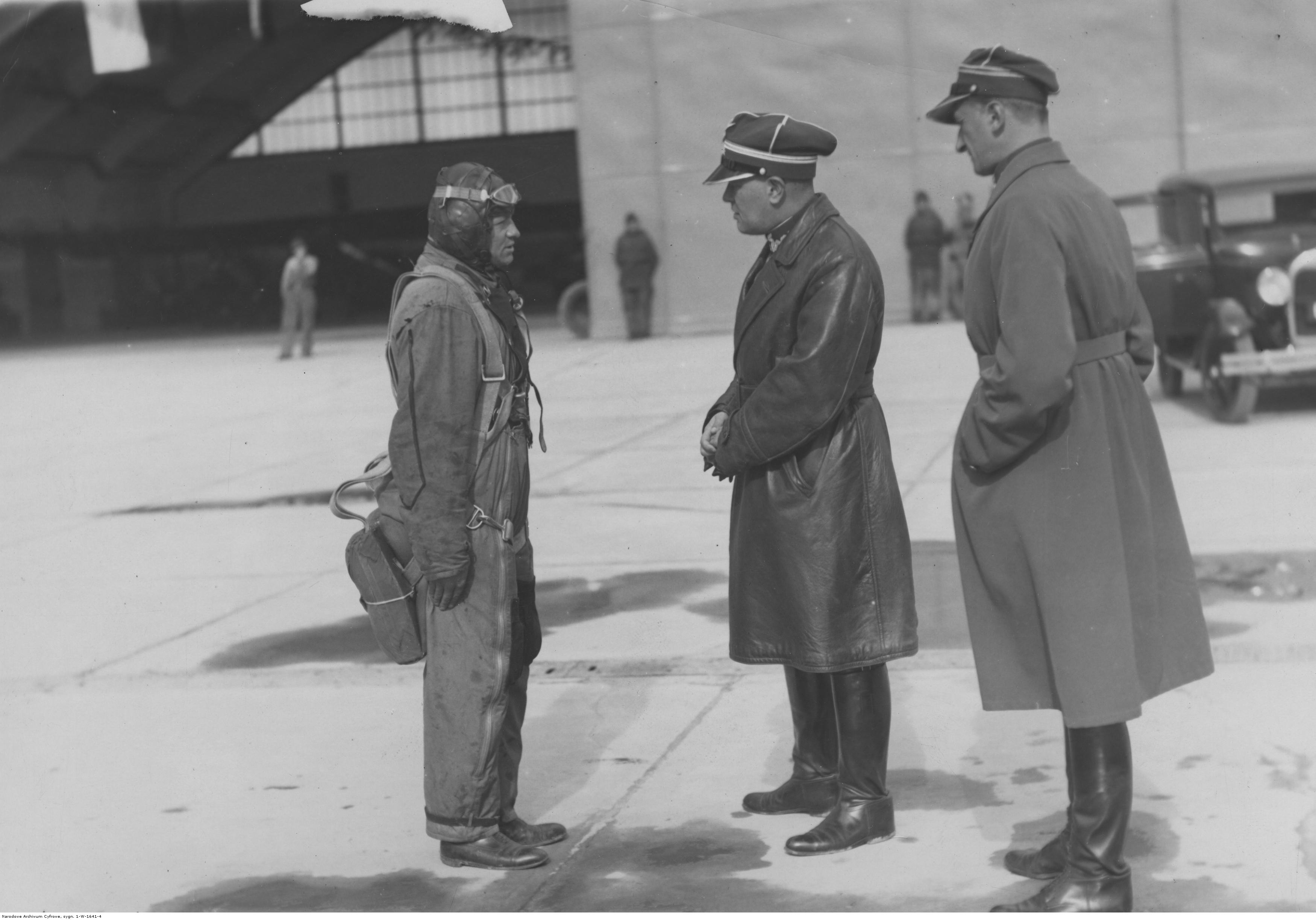 Centralne zawody lotnicze w Warszawie, wrzesień 1931. Por. Apoloniusz Protassowicz (z lewej) składa raport płk. Januszowi de Beaurain (w środku). Koncern Ilustrowany Kurier Codzienny - Archiwum Ilustracji. Sygnatura: 1-W-1641-4